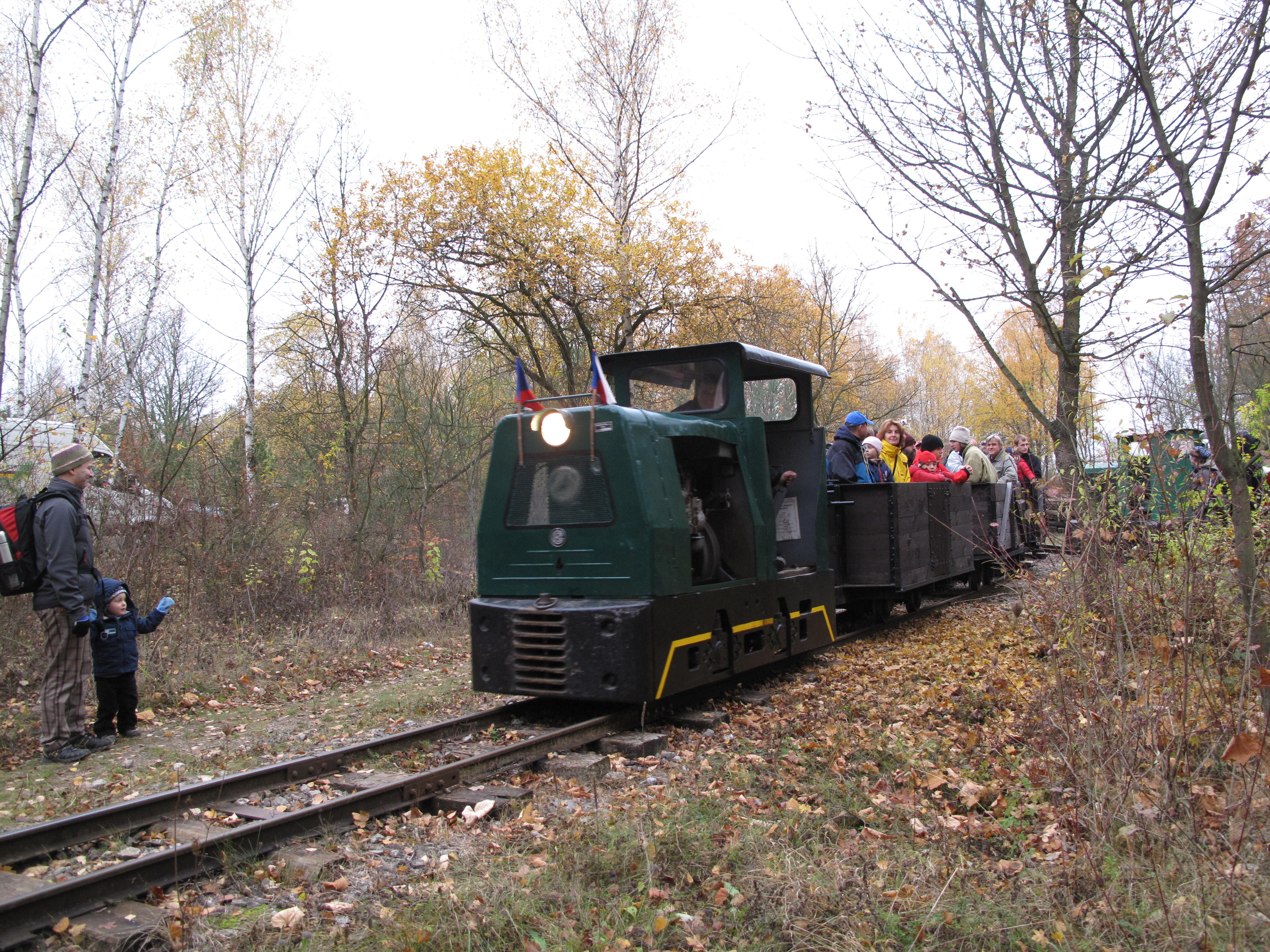 Česky: Lokomotiva BN30R